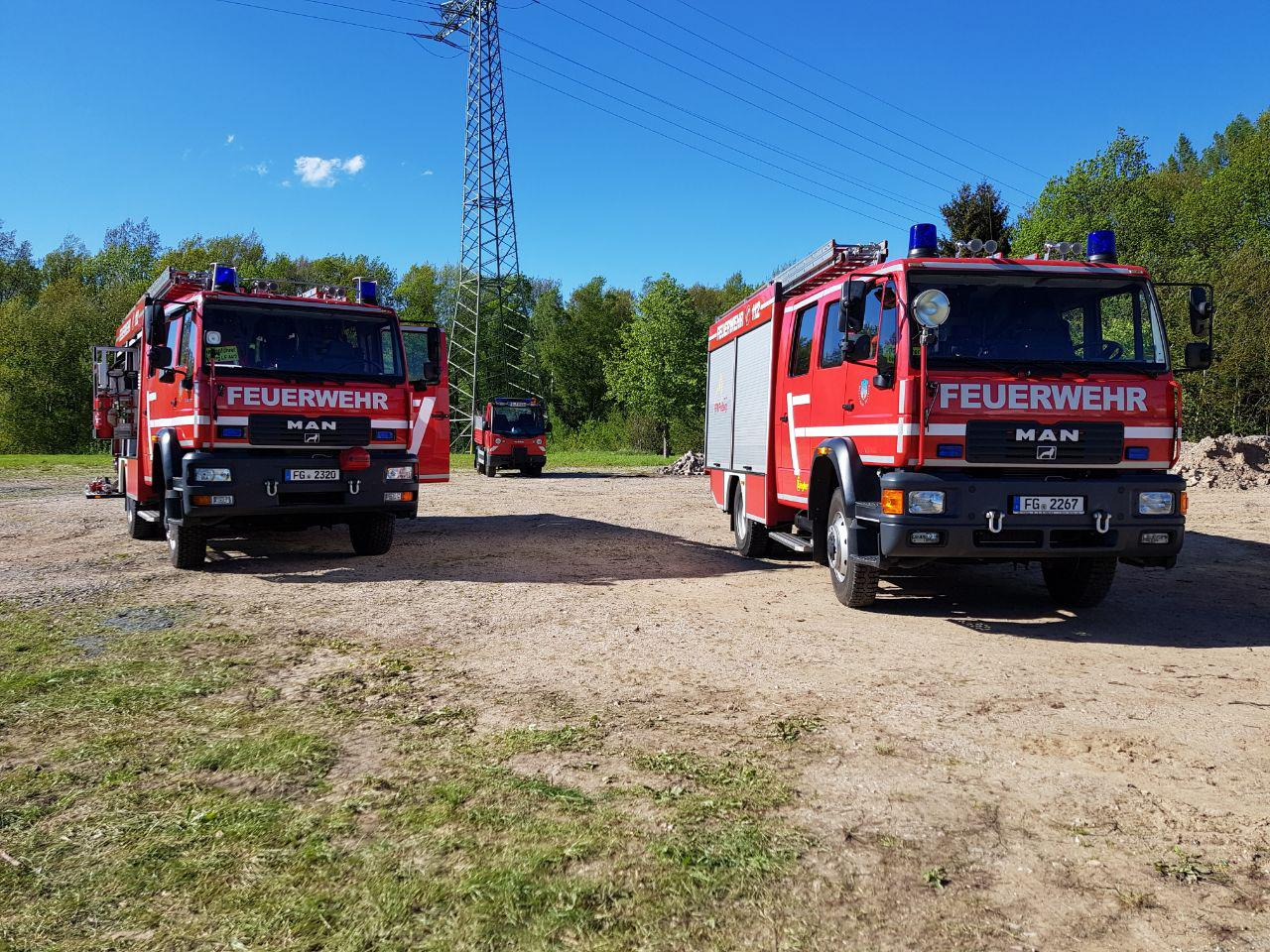 Von links: LF 16/12-TS, Multicar und LF 16/12-TH bei einer Präsentation